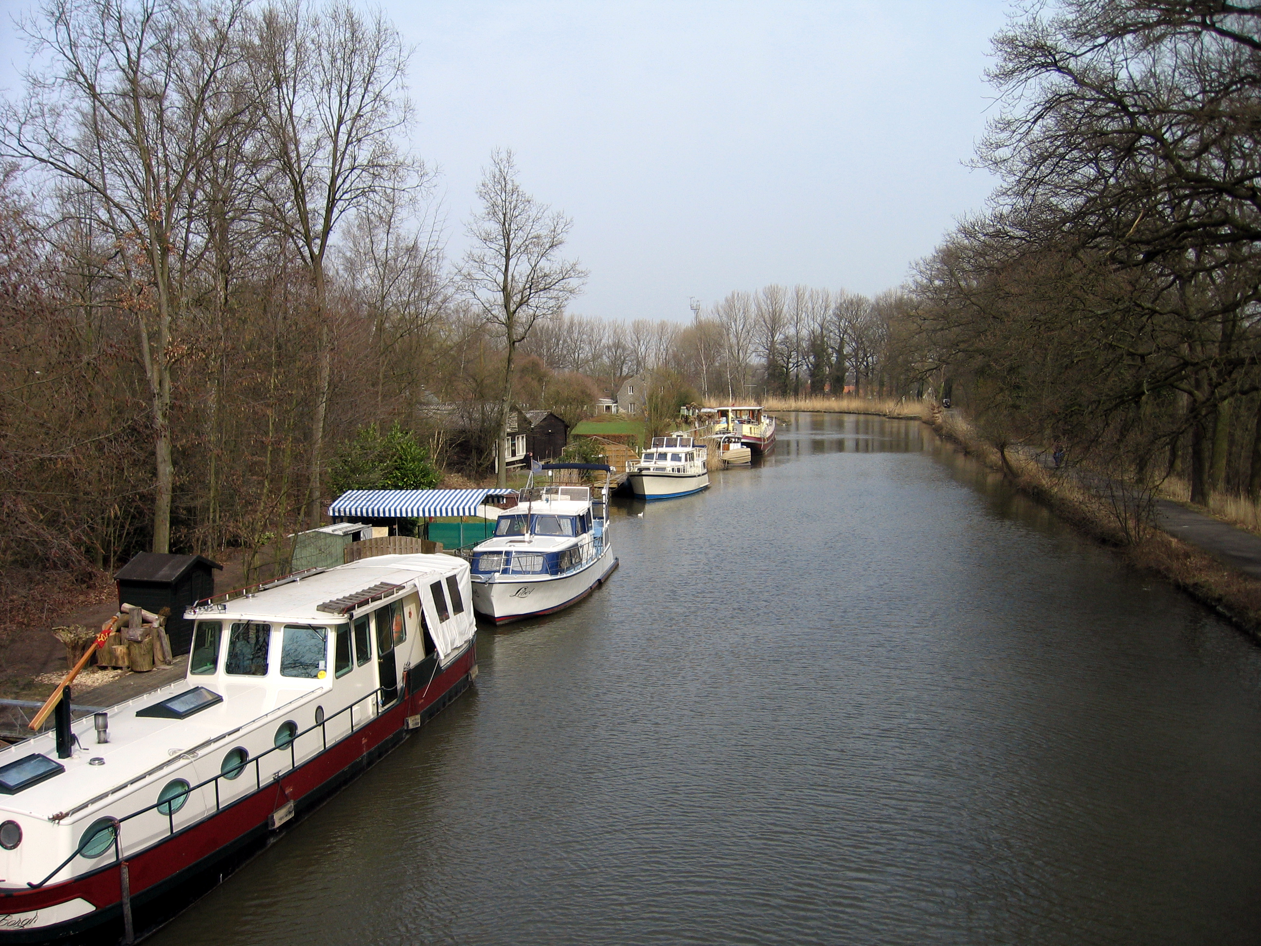 "Het eilandje", gekend gebied omgeven door water van de Zuid-Willemsvaart.